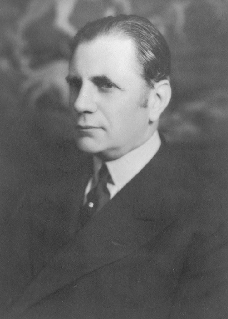 Photograph of Claude de Bernales (1876–1963).